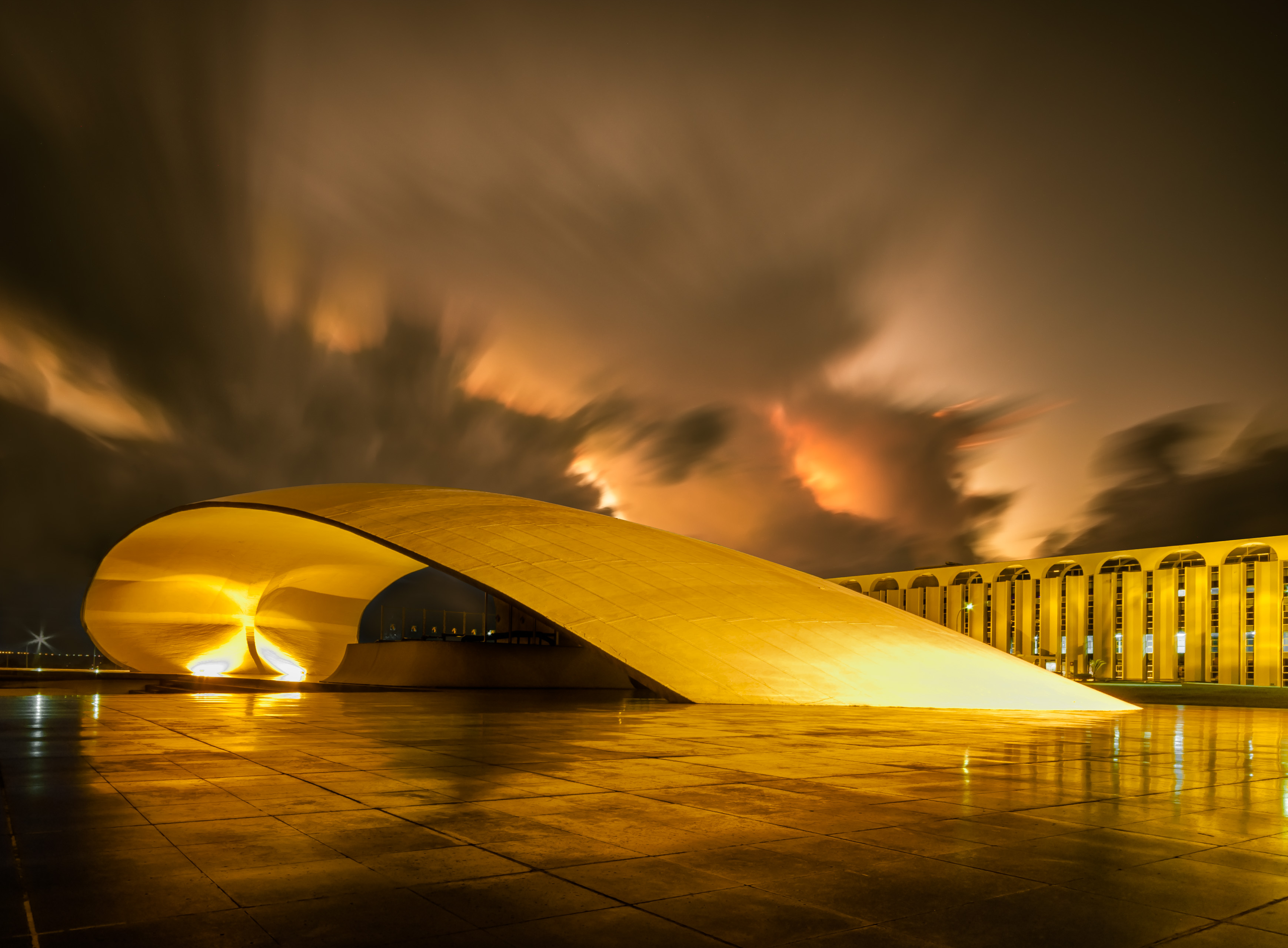 Brasilia-Monumento a Duque de Caxias